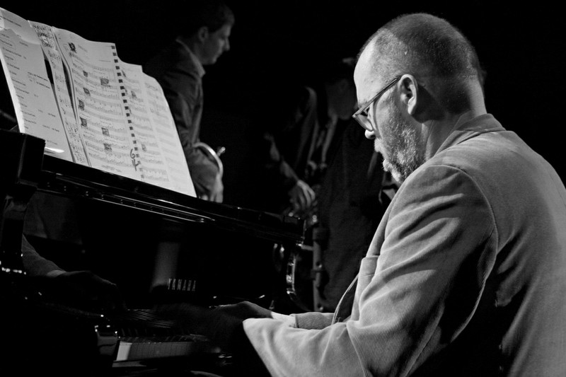 Georg Ruby auf dem Jazzfestival St. Ingbert 2010